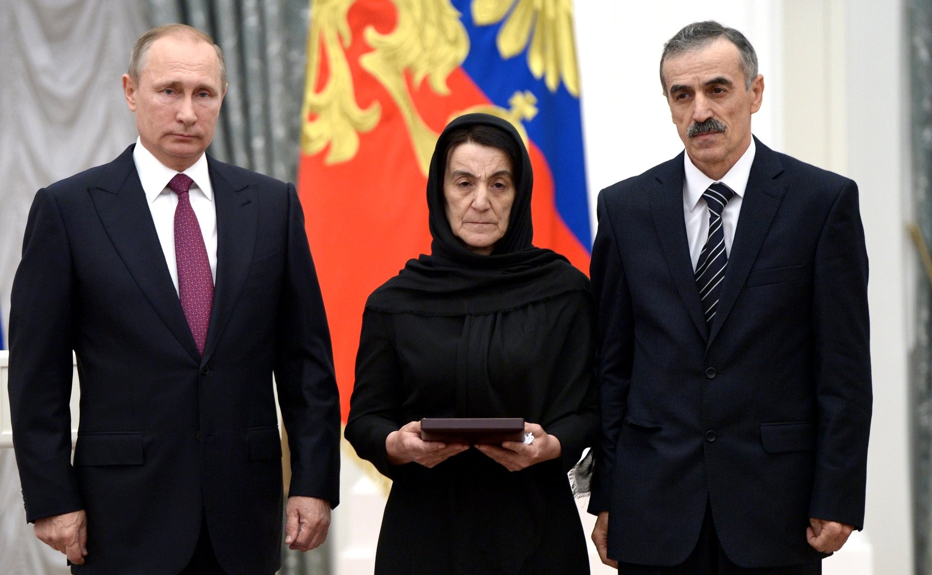 Владимир Путин с Нурбагандом и Кумсият Нурбагандовыми – родителями лейтенанта полиции Магомеда Нурбагандова, посмертно награждённого Звездой Героя Российской Федерации.